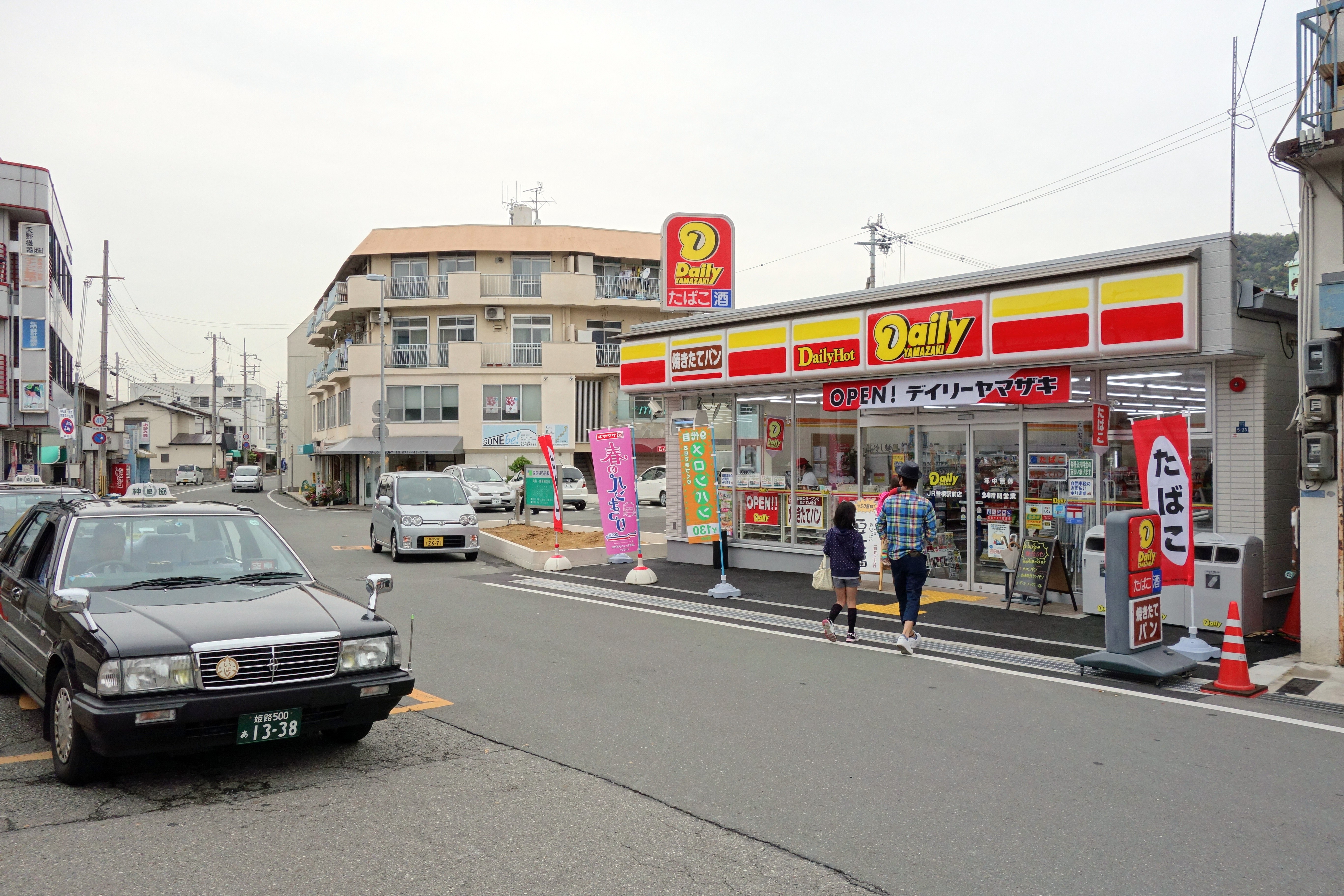 曽根駅 （JR神戸線） 駅前 （兵庫県高砂市阿弥陀）